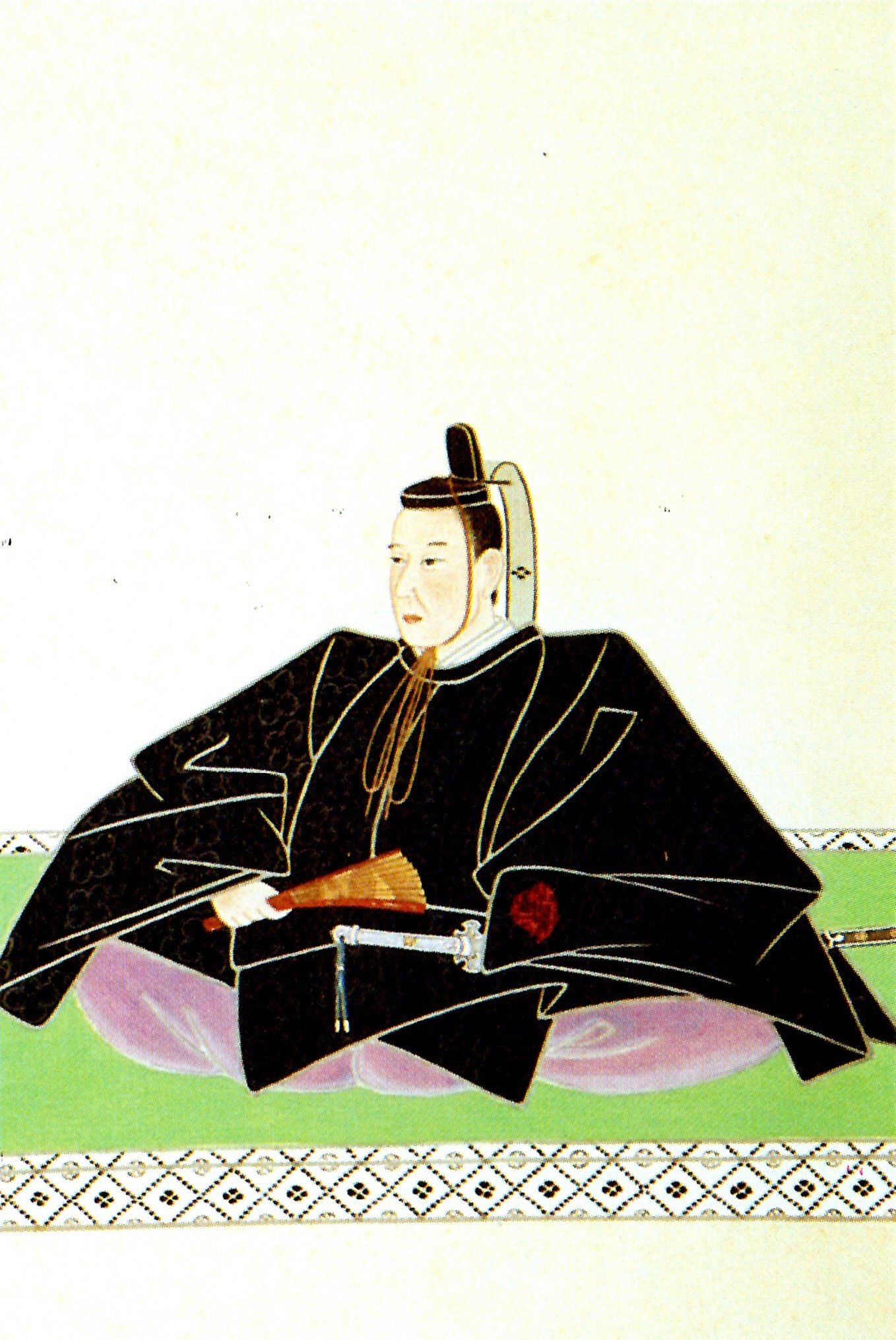 戸田氏教の肖像。